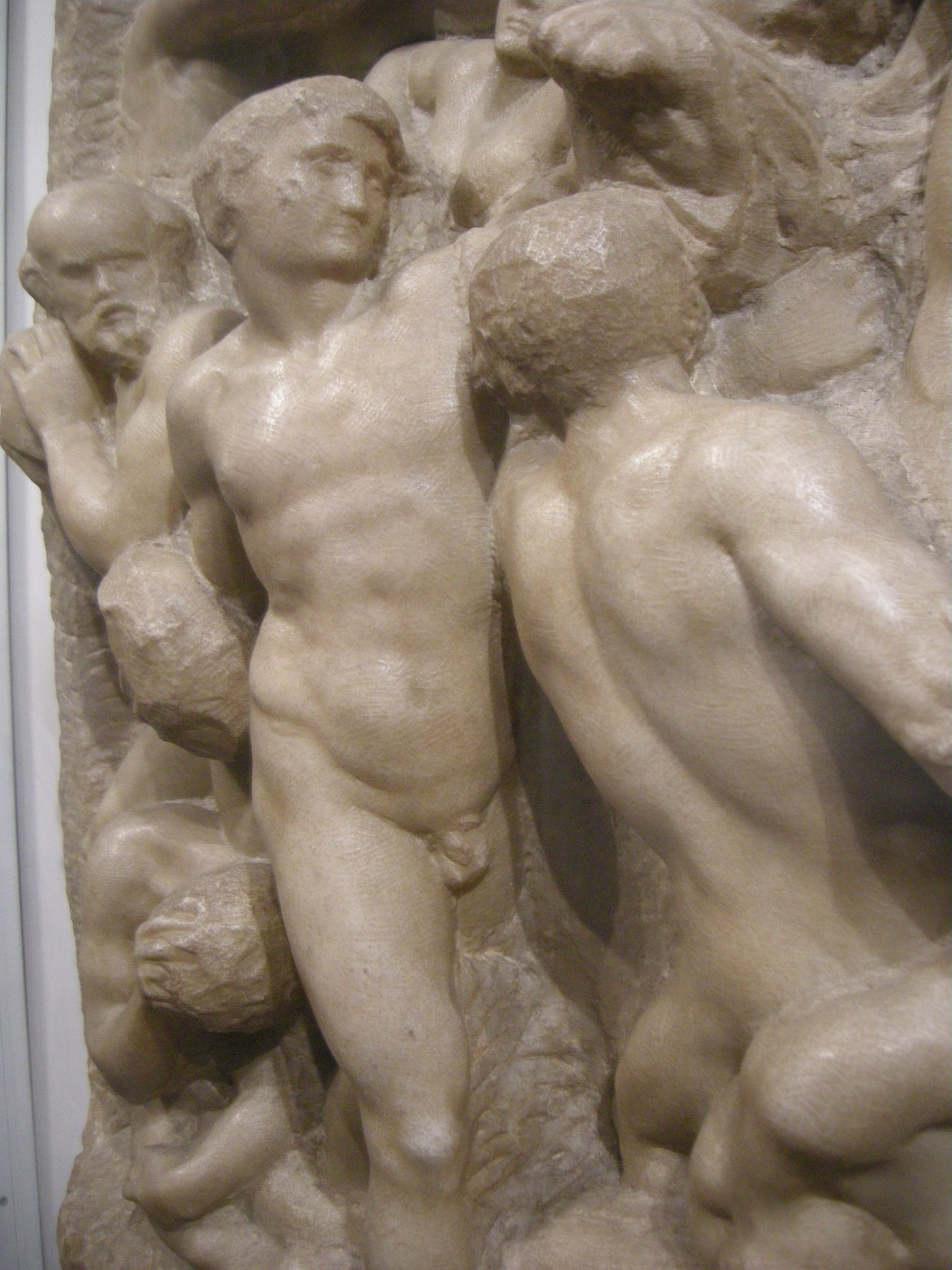 Michelangelo, centauromachia, 1492 ca.